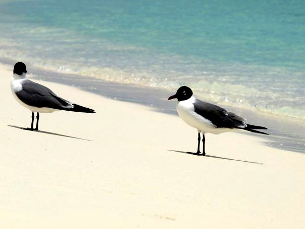 Guanaguanre (Larus atricilla) de los Roques Venezuela